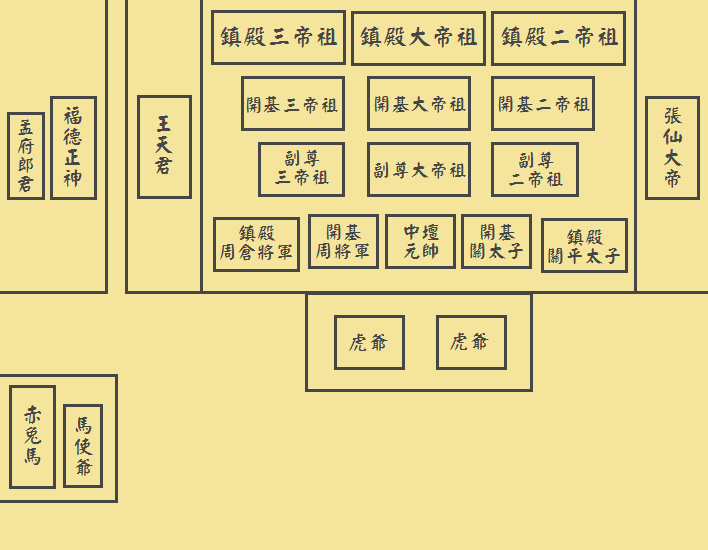 中文（台灣）: 高雄文武聖殿一樓平面圖；使用本圖片請遵循(CC 姓名標示-非商業性-禁止改作)，Please follow (CC BY-NC-ND 3.0 TW)